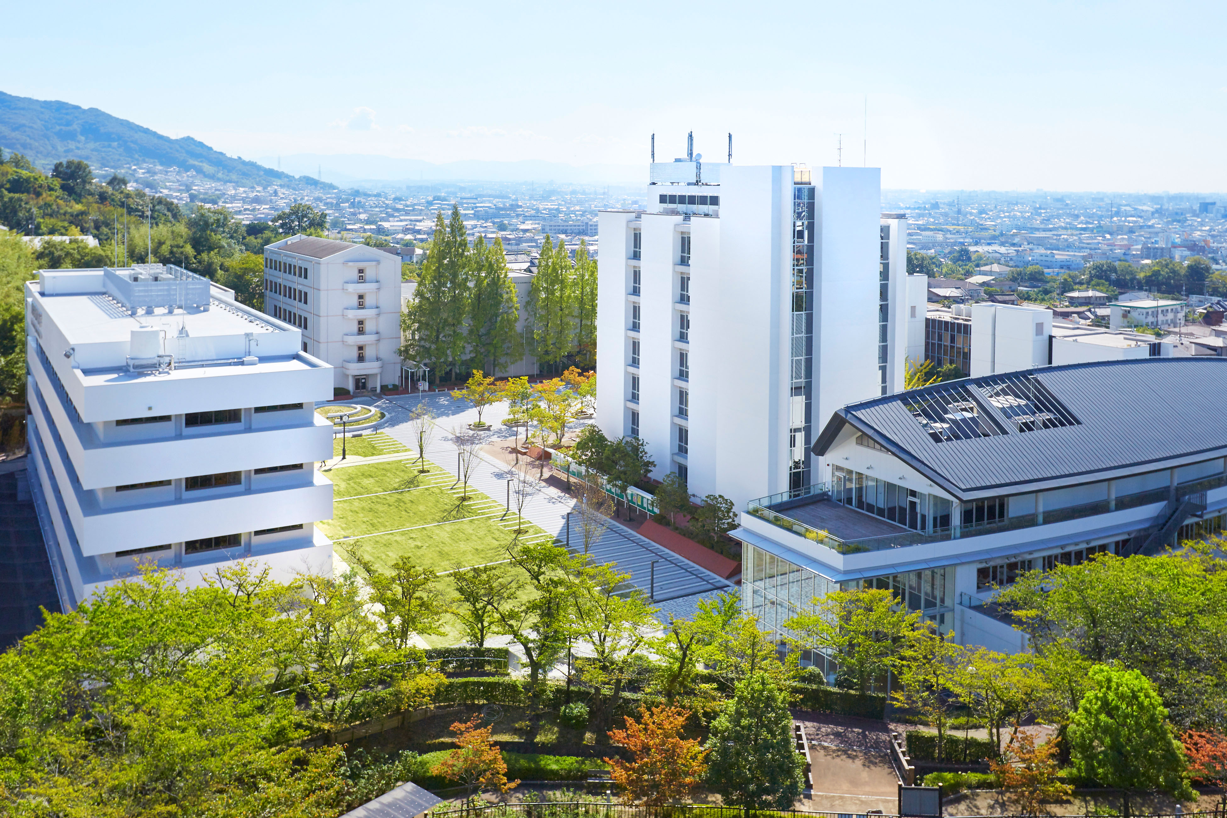 花岡キャンパス全景